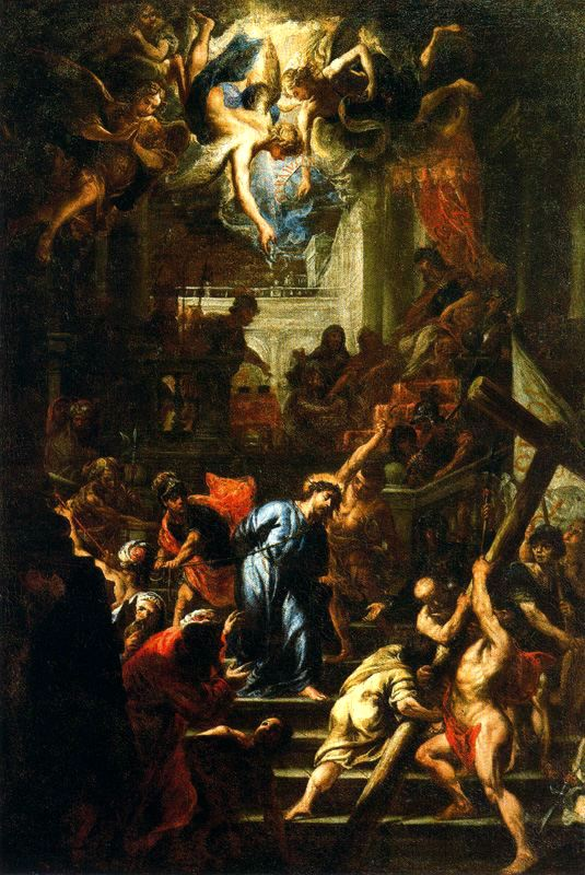 La obra representa a Jesucristo en el Pretorio.